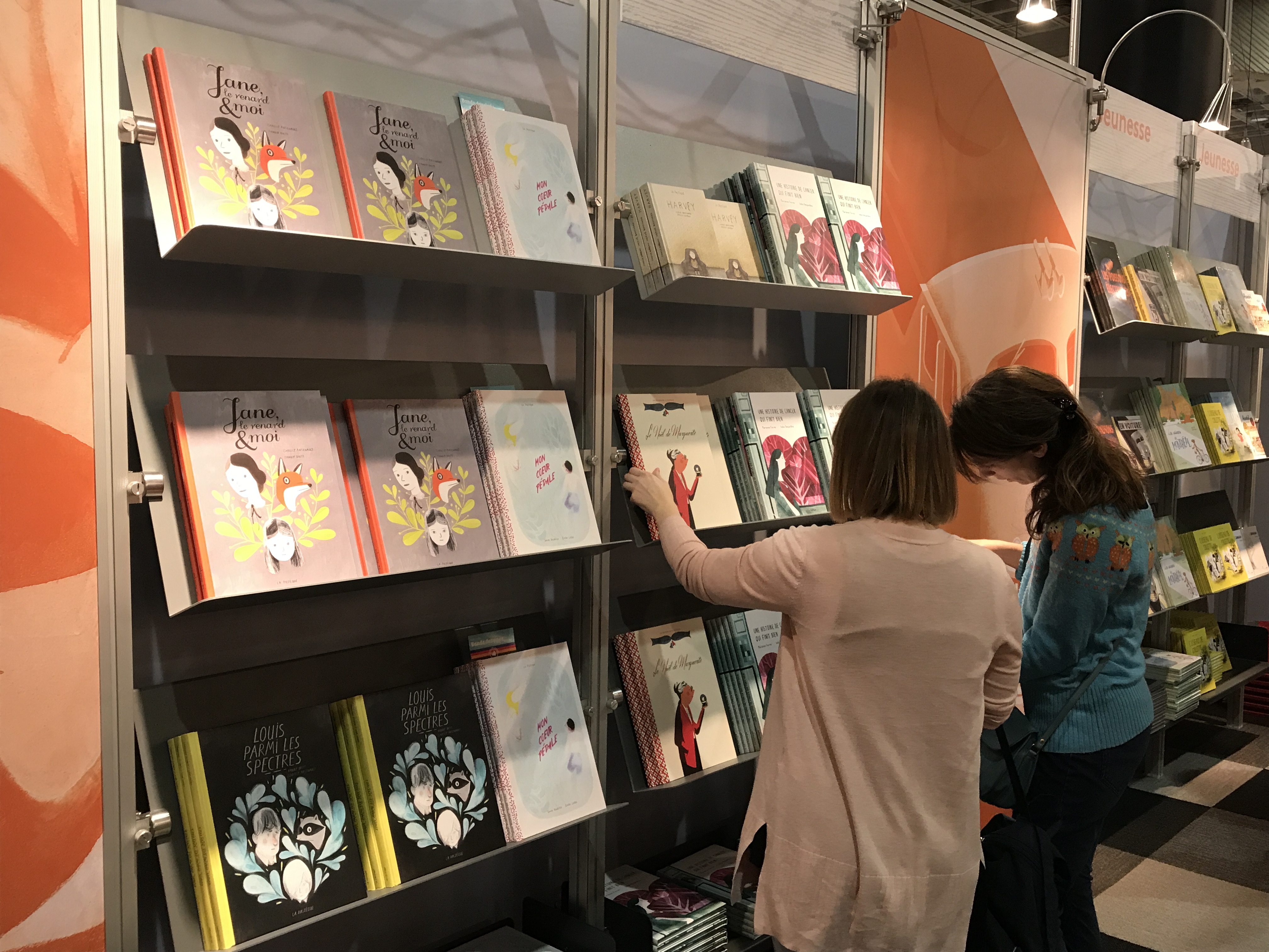 Editions La Pastèque